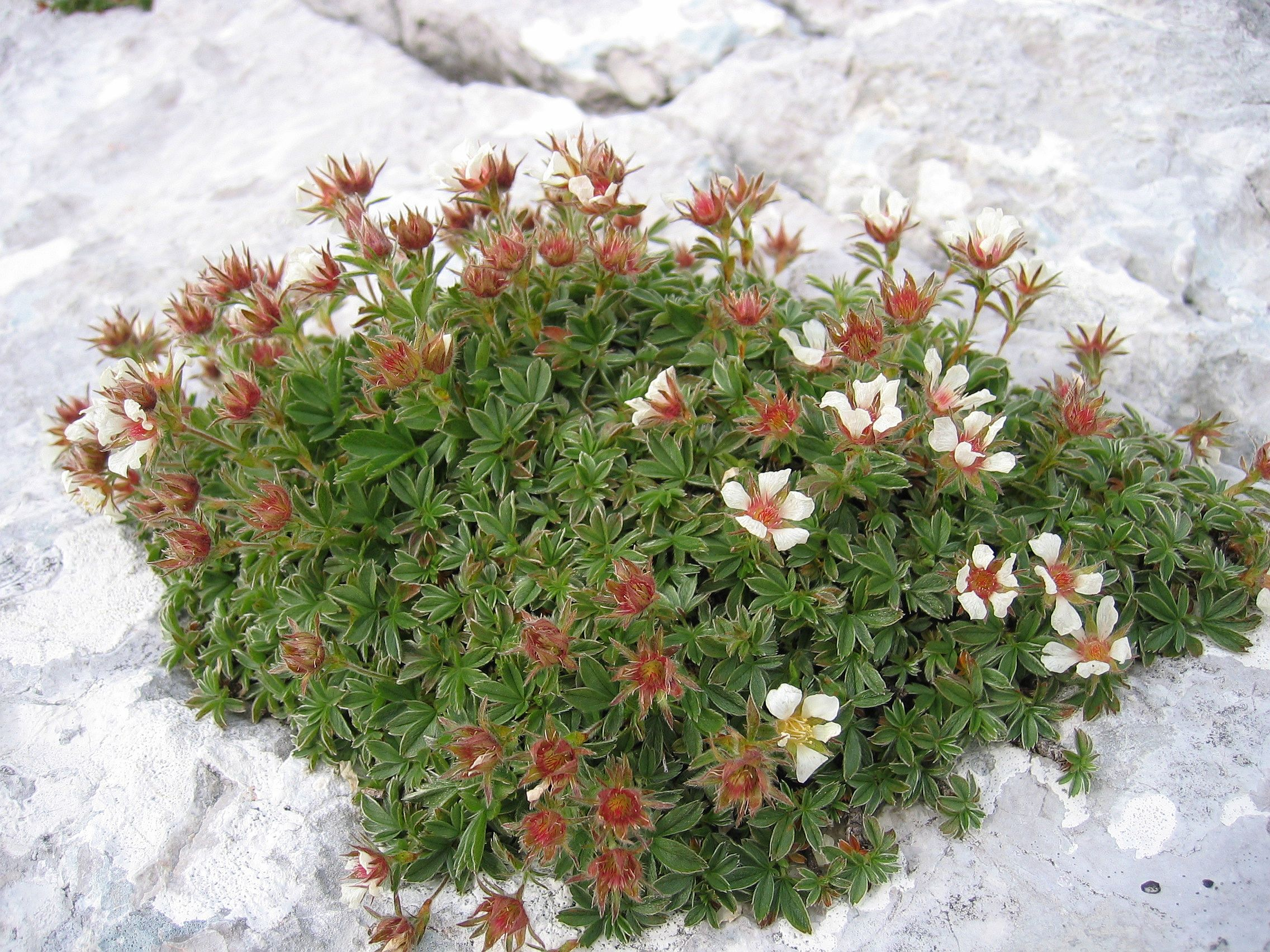 Potentilla clusiana Dachsteinplateau, Upper Austria, Austria